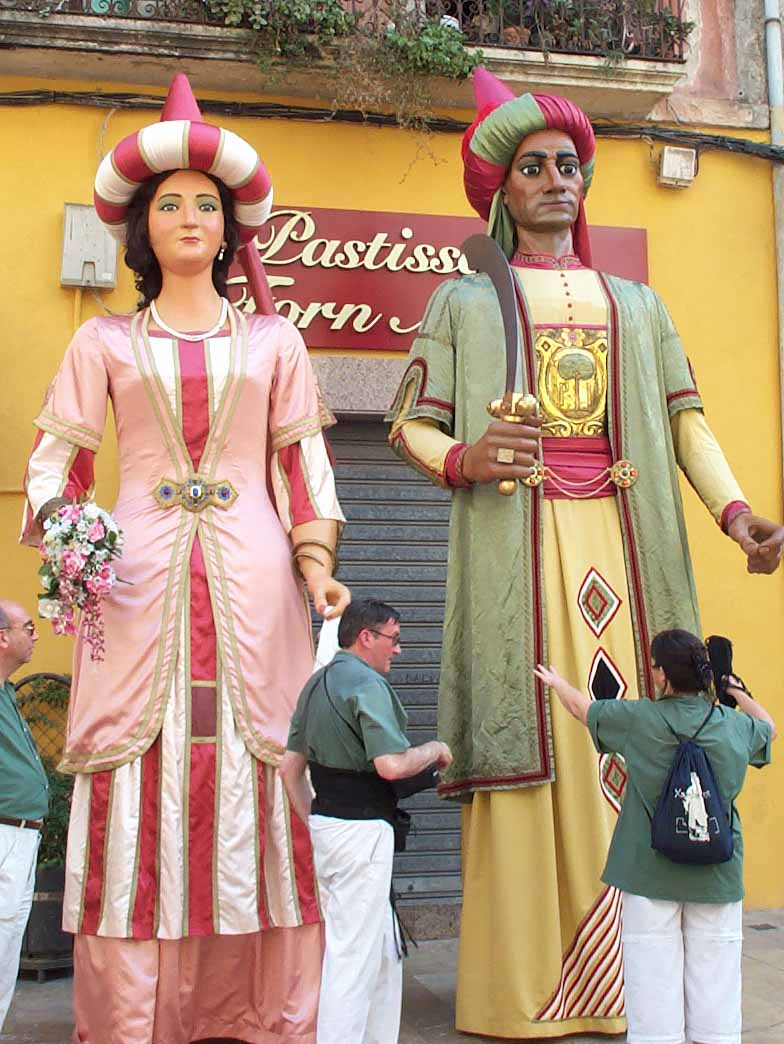 El Gegant del Pi (Barcelona)